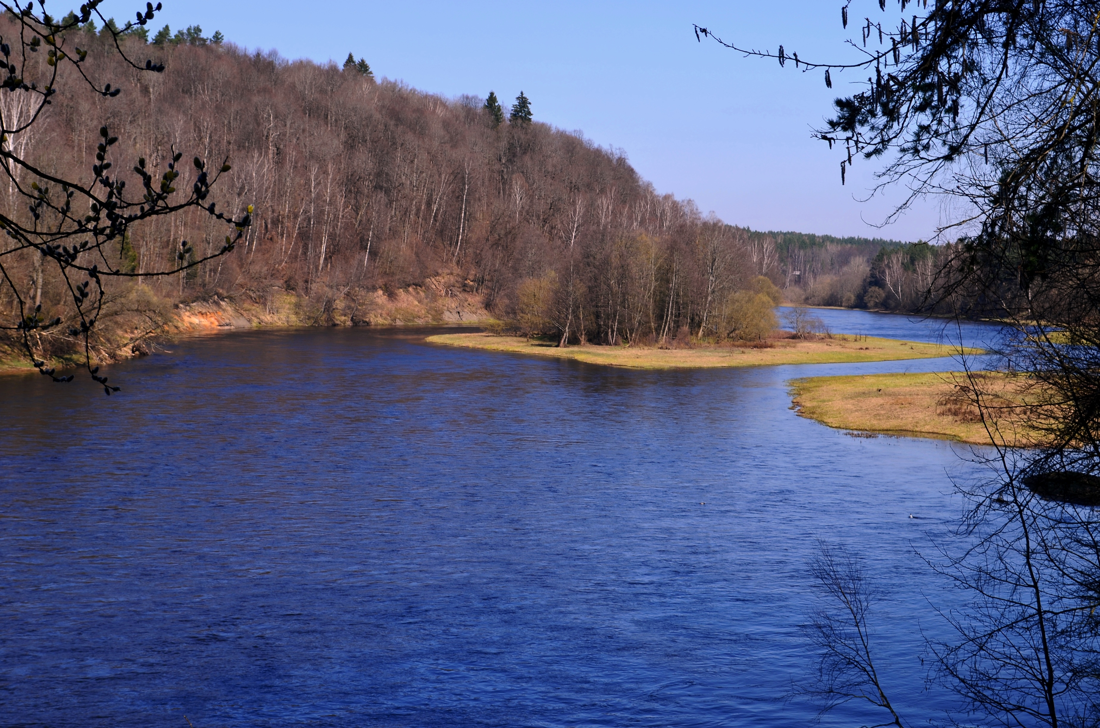 Salos Neryje ties Vyriais, Vilnius